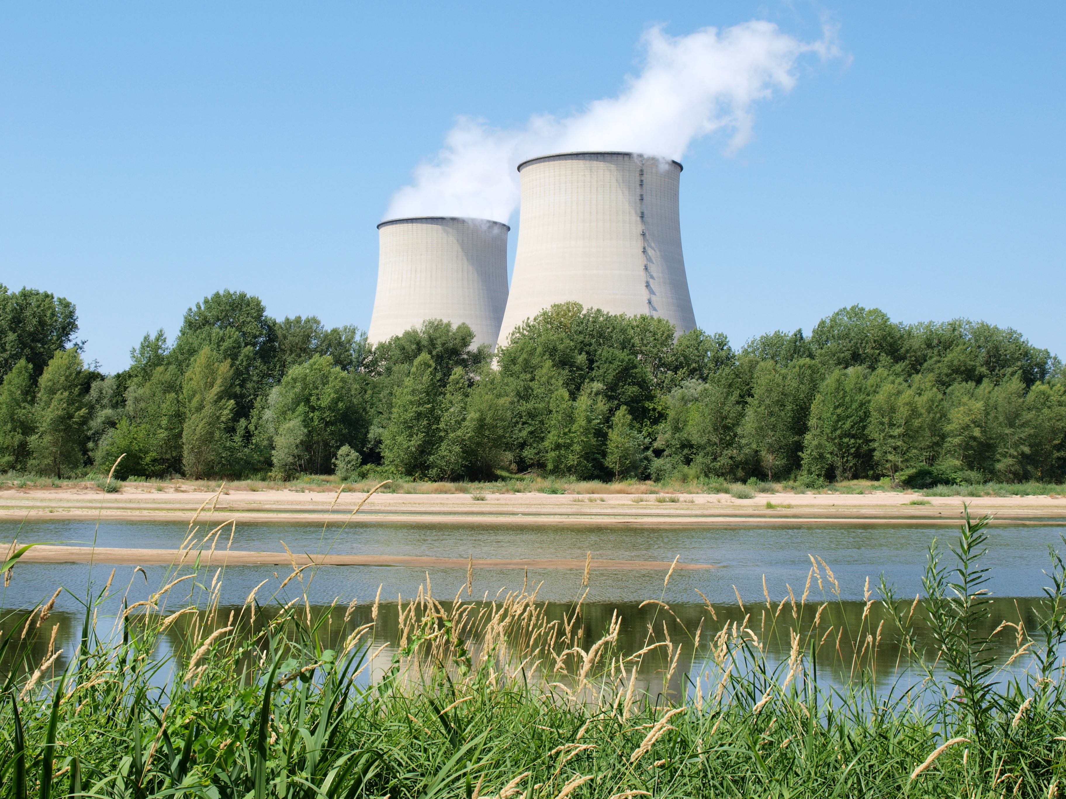 La centrale nucléaire de Belleville (Cher, France), vue de la rive nivernaise de la Loire.